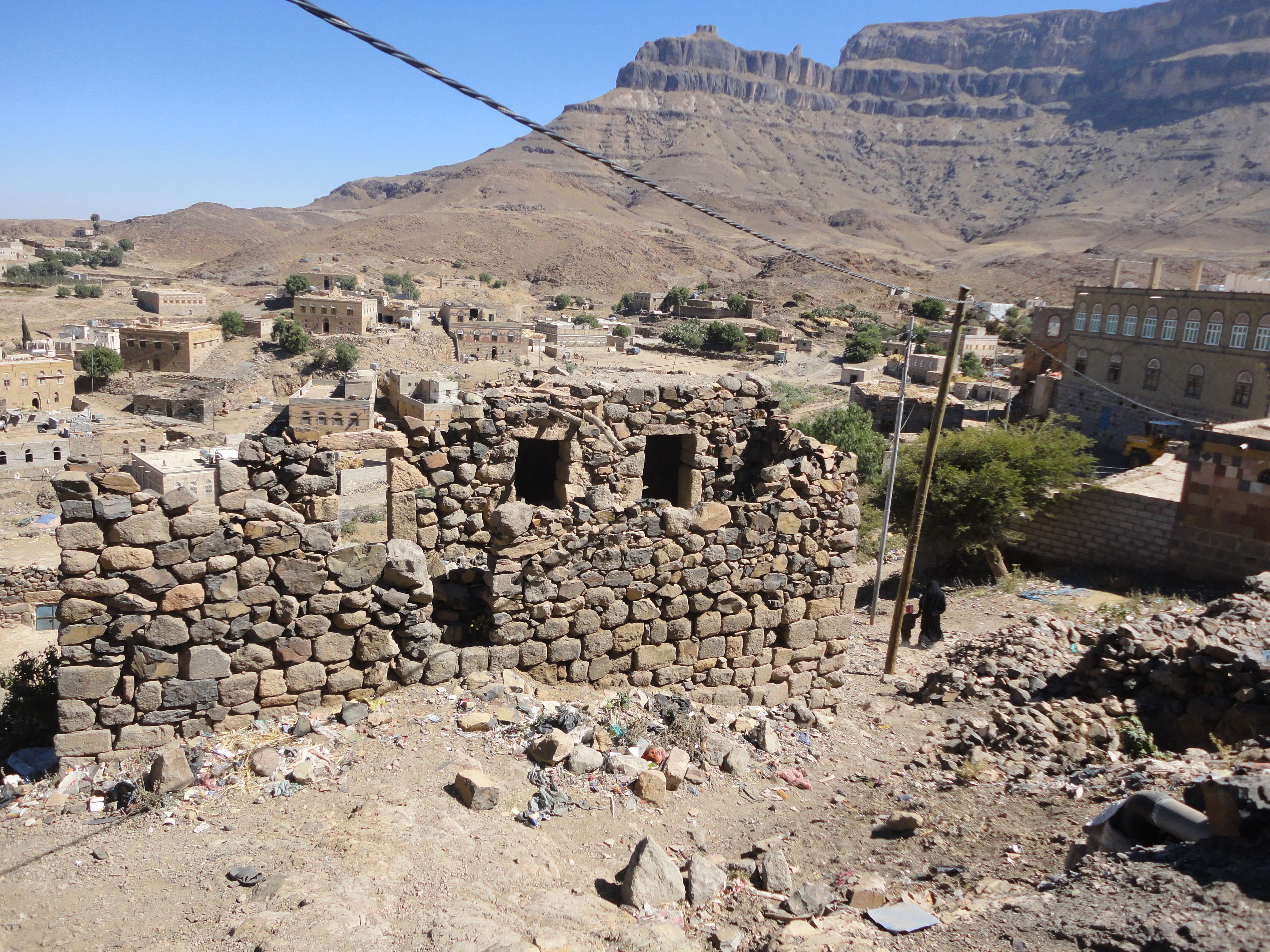 قرية نعض